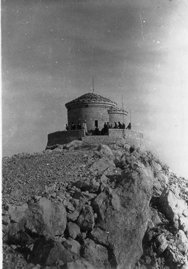 Lovćen